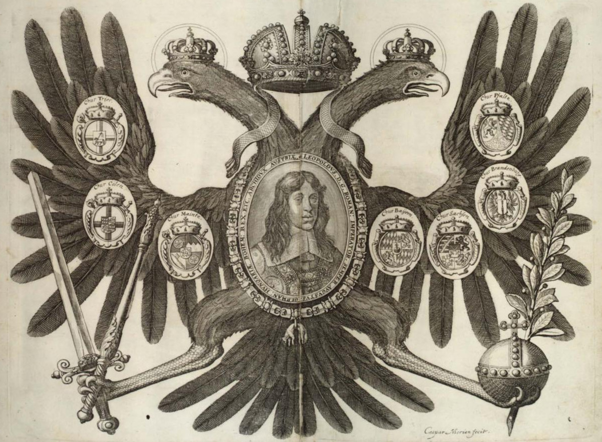 Reichsadler mit den kurfürstlichen Wappen und dem Porträt Leopolds I. in Caspar Merians Krönungsdiarium von 1658 (nähere Beschreibung bei wikisource).